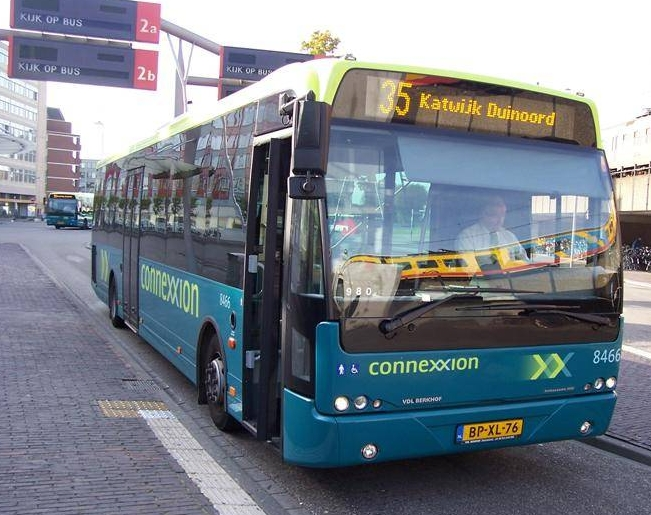 Berkhof Ambassador op de Katwijkse Lijn 35 richting Duinoord, hier op het Stationsplein te Leiden. Route lijn 35: Station Leiden - Leiden Verbeekstraat - Transferium 't Schouw - Valkenburg - Wilgenhoek - 't Heen - Hoornespassage - Boulevard (Centrum/Strand) - Vuurbaakplein - Duinoord.